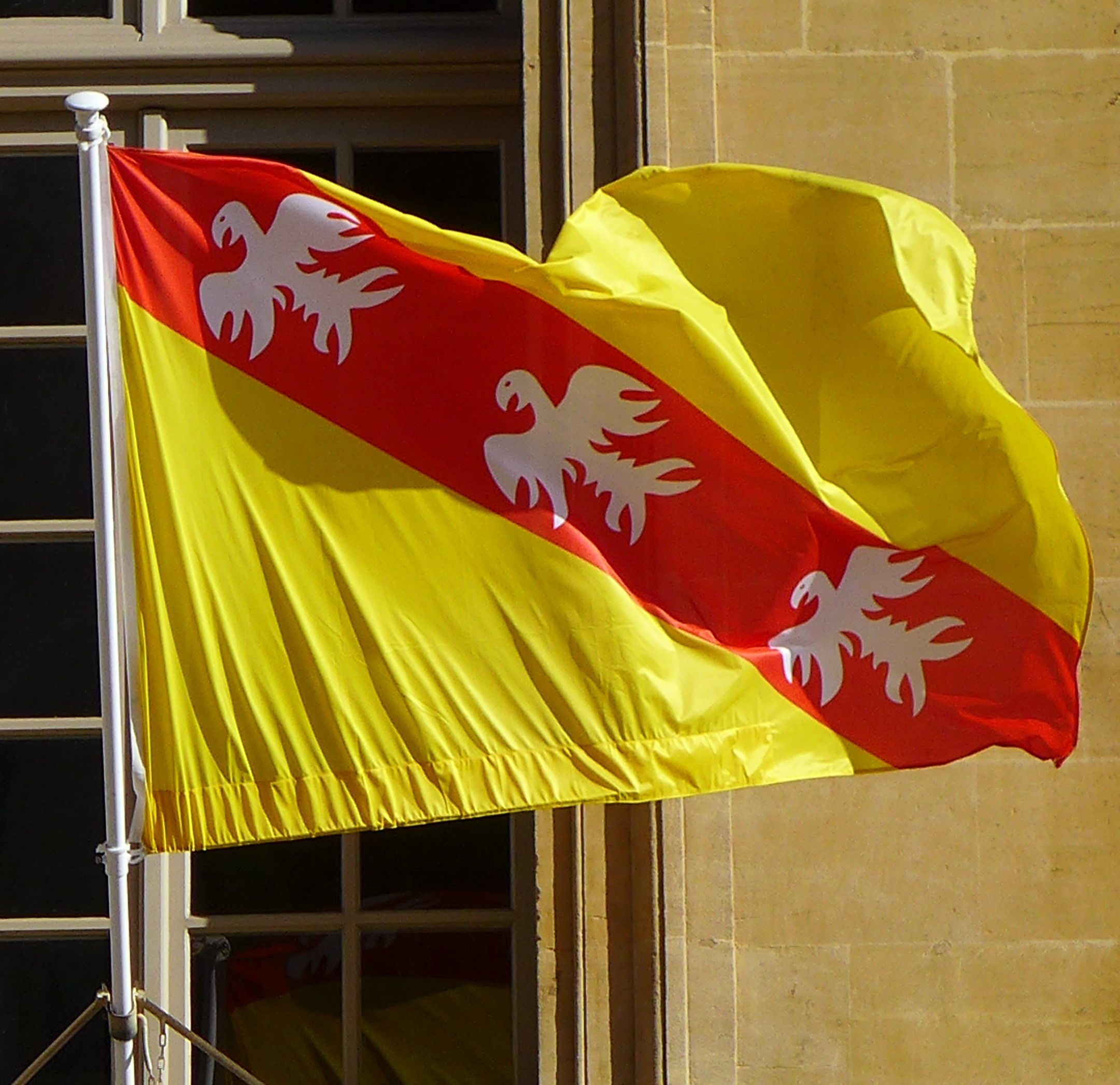 Flagge von Lothringen am Metzer Rathaus.